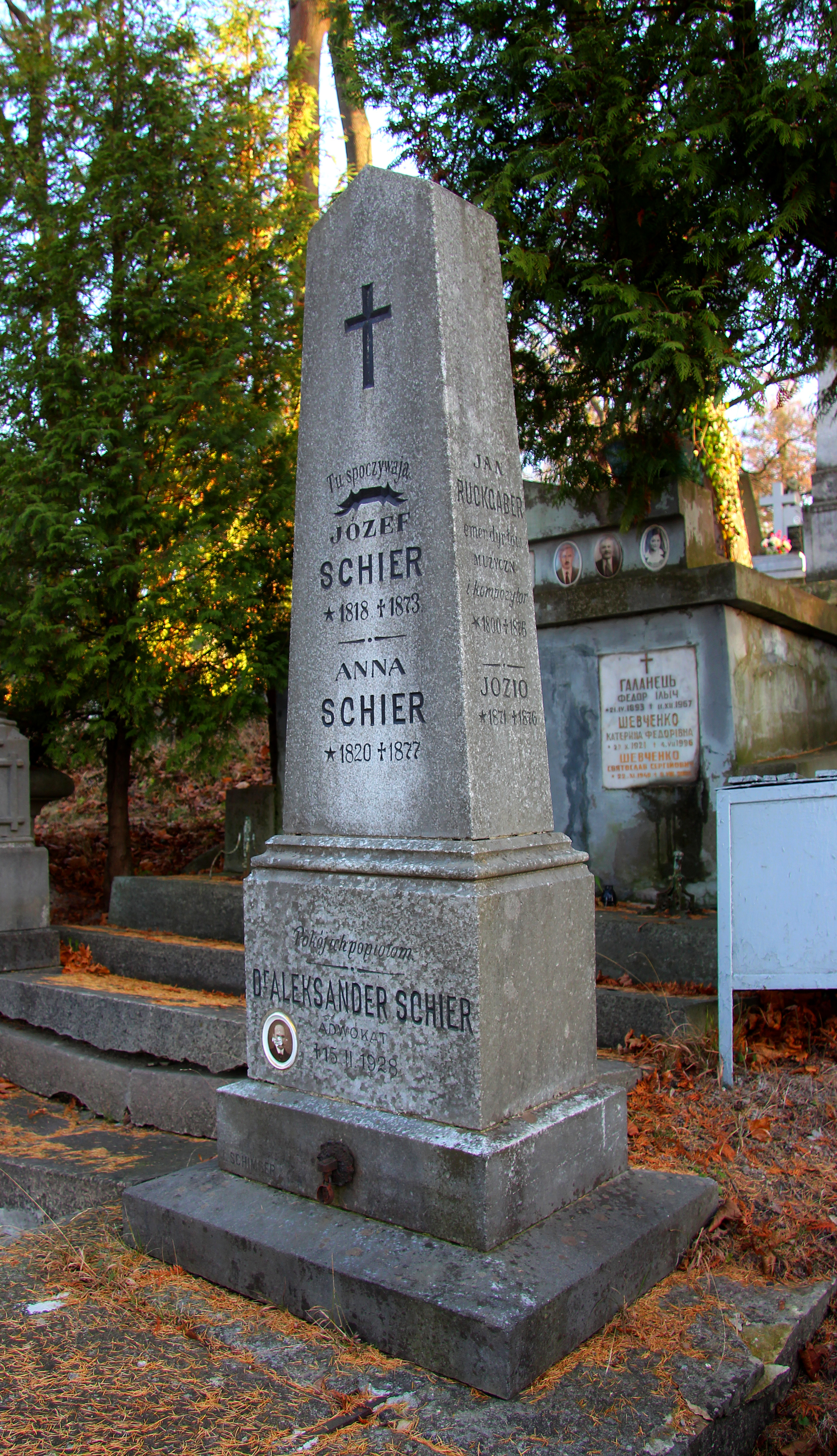 Jan Ruckgaber. Cmentarz Łyczakowski